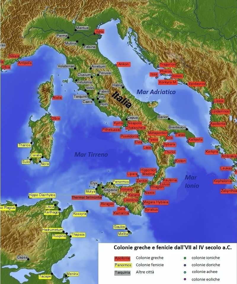 Carta geografica storica con la localizzazione delle colonie greche e fenicie in Italia e nelle regioni circostanti, dall'VIII al IV secolo a.C.